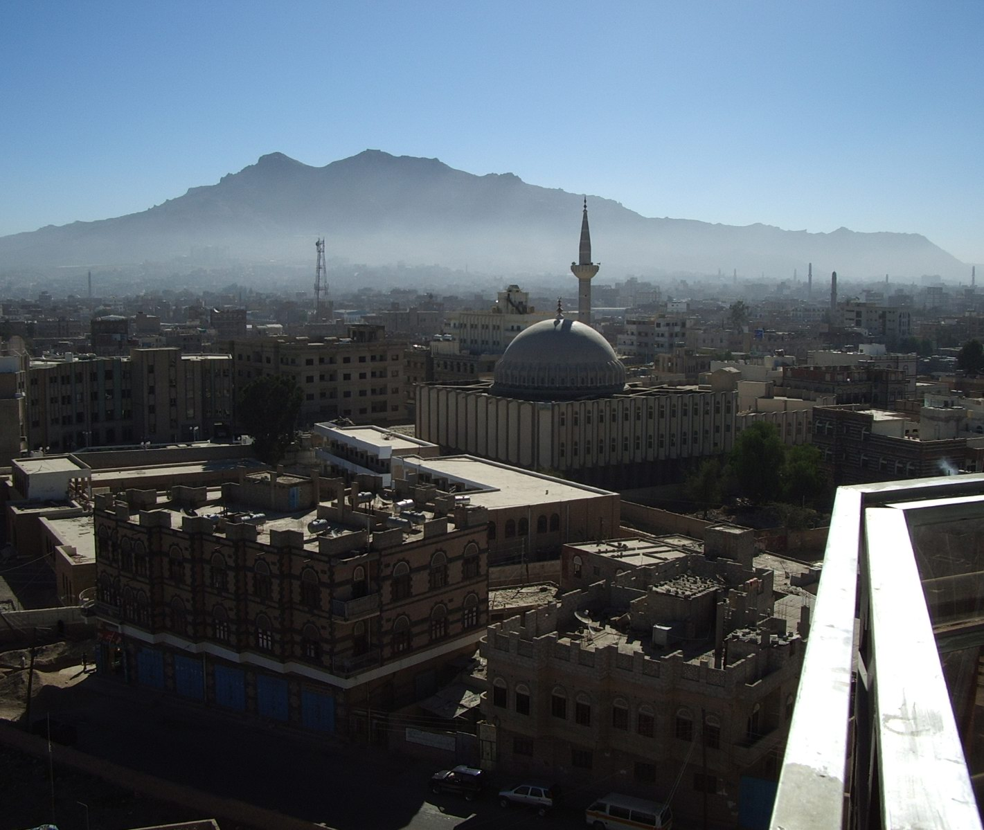 Yemen - Mosque in Sanaa